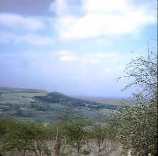 Relief de côte dans le Bassin parisien. Vue prise vers le sud, à Jouy-les-Côtes.. Au fond à gauche, la cuesta.En avant, couverte de bois une butte -témoin. A droite la dépression de la Woëvre